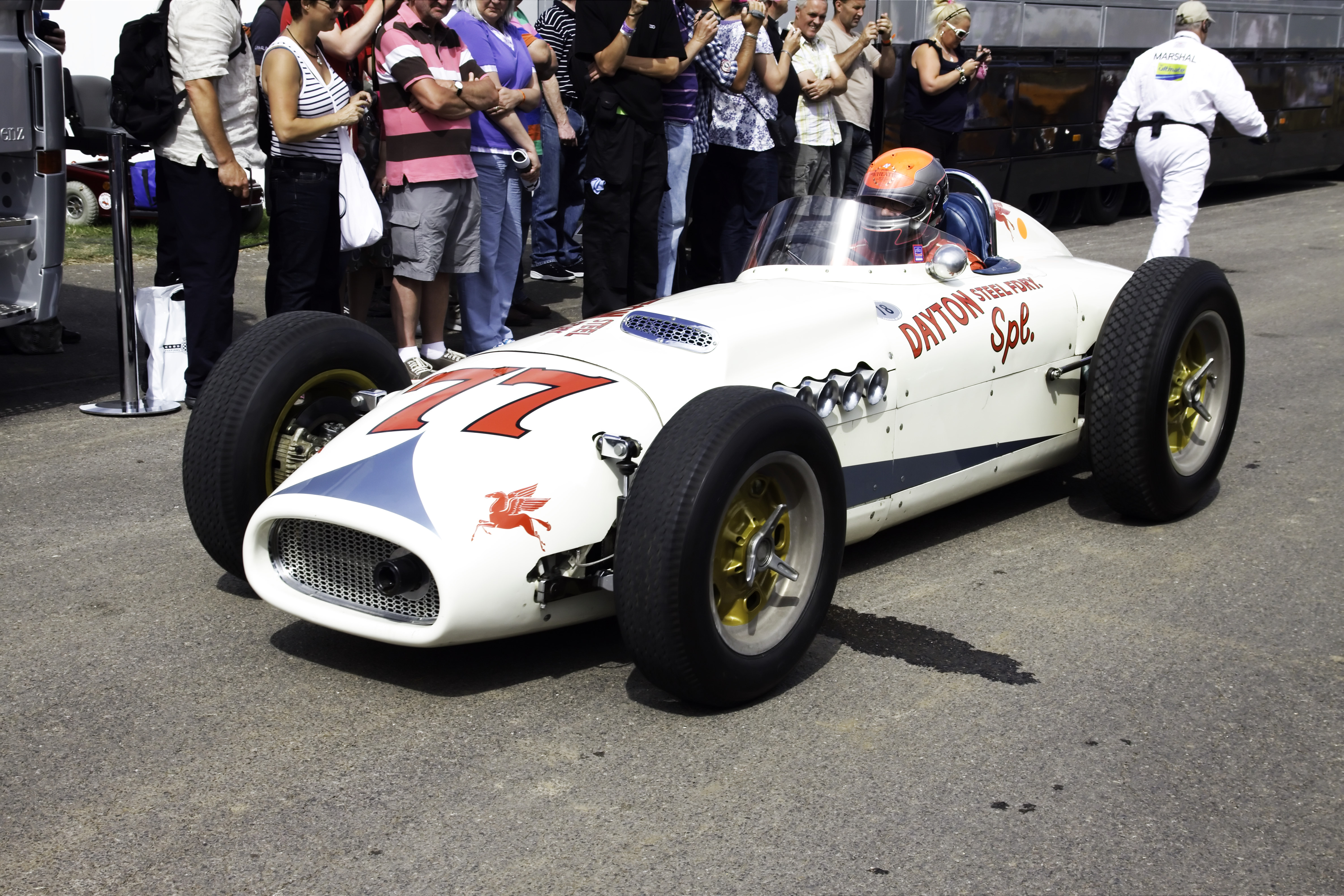 Kurtis Kraft-Offenhauser "Dayton Steel Foundary Special"